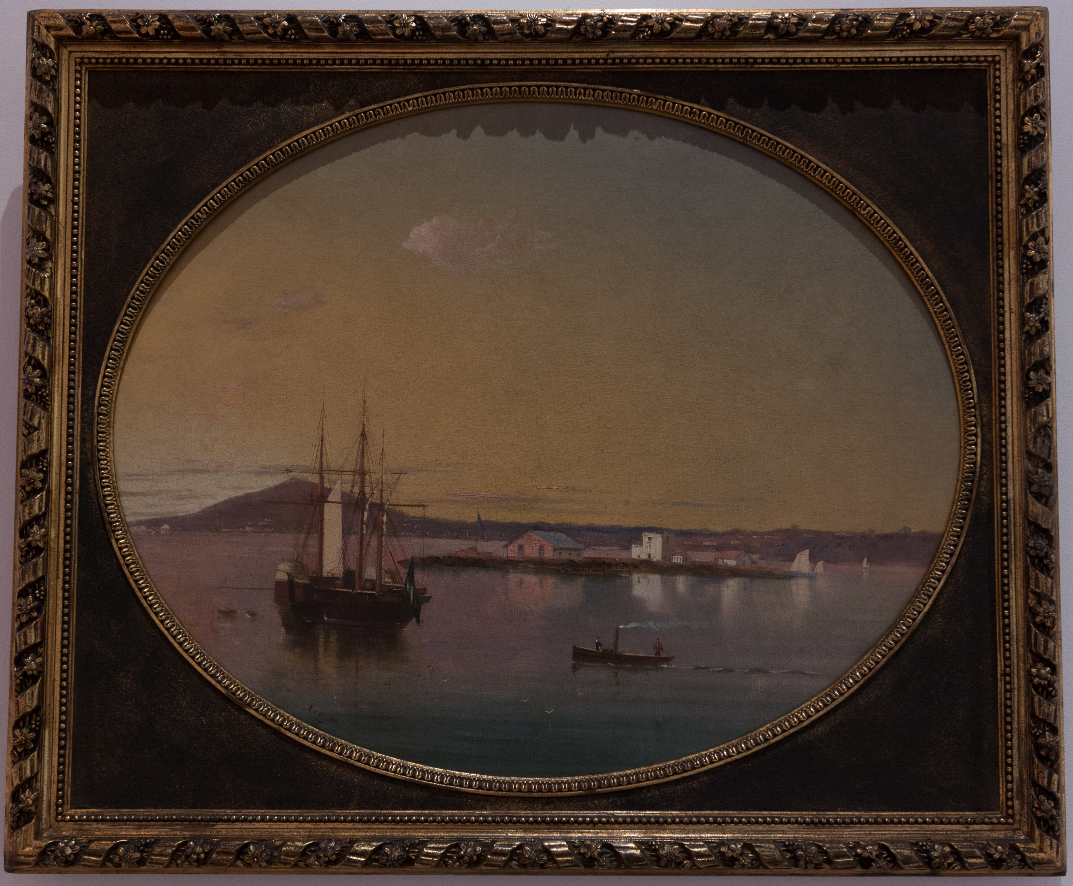 Obra da coleção Brasiliana Iconográfica.